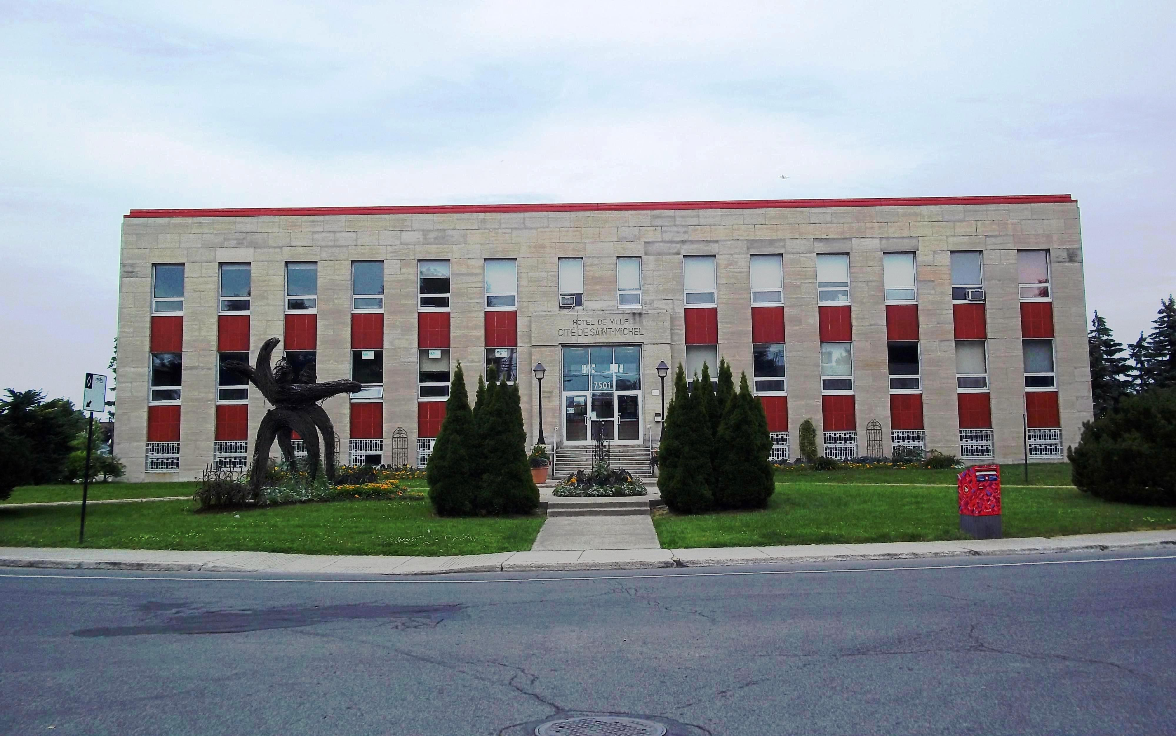 Mairie d'arrondissement de Villeray–Saint-Michel–Parc-Extension, 7501, rue François-Perrault, Montréal